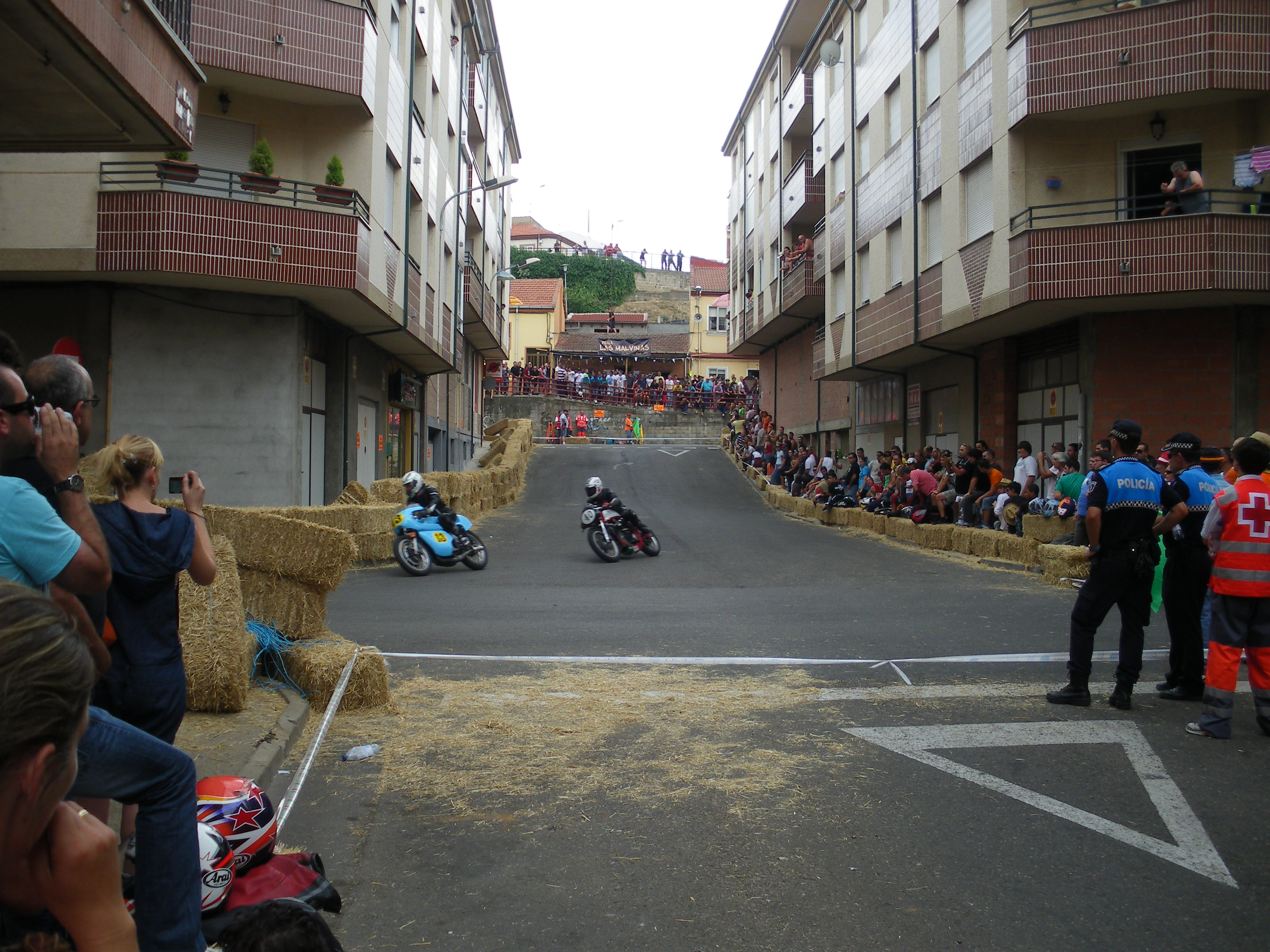 En el 52º Gran Premio de Velocidad de Motos Clásicas de La Bañeza